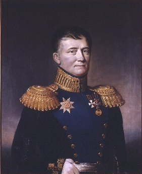 Öljymaalaus kankaalle. Miehen puolivartalokuva, oikealle kääntynyt. Oikea käsi nostettu vyötärölle, peukalo vyön alla.Tummat hiukset, kammattu otsalle. Kadettikunnan univormu: tummanvihreä takki, sininen pystykaulus ja reväärit. Kullanväriset napit, kirjailut ja epoletit. Rinnassa kunniamerkkejä: Pyhän Annan 1. luokan ritarimerkki kruunun kera rintatähtenä, Pyhän Vladimirin 4. luokan ritarimerkki, Pyhän Yrjön ritarikunnan merkki (ilmeisesti 4.luokka) sekä virka-ansiomerkki 30 vuoden palveluksesta. Tumma tausta joka vaalenee alareunaa kohden. Kullattu kehys. Profiloidun kehyksen ulkoreunassa munasauva-koriste. Kehyksen alalaidassa teksti: Direktor Thesleff.